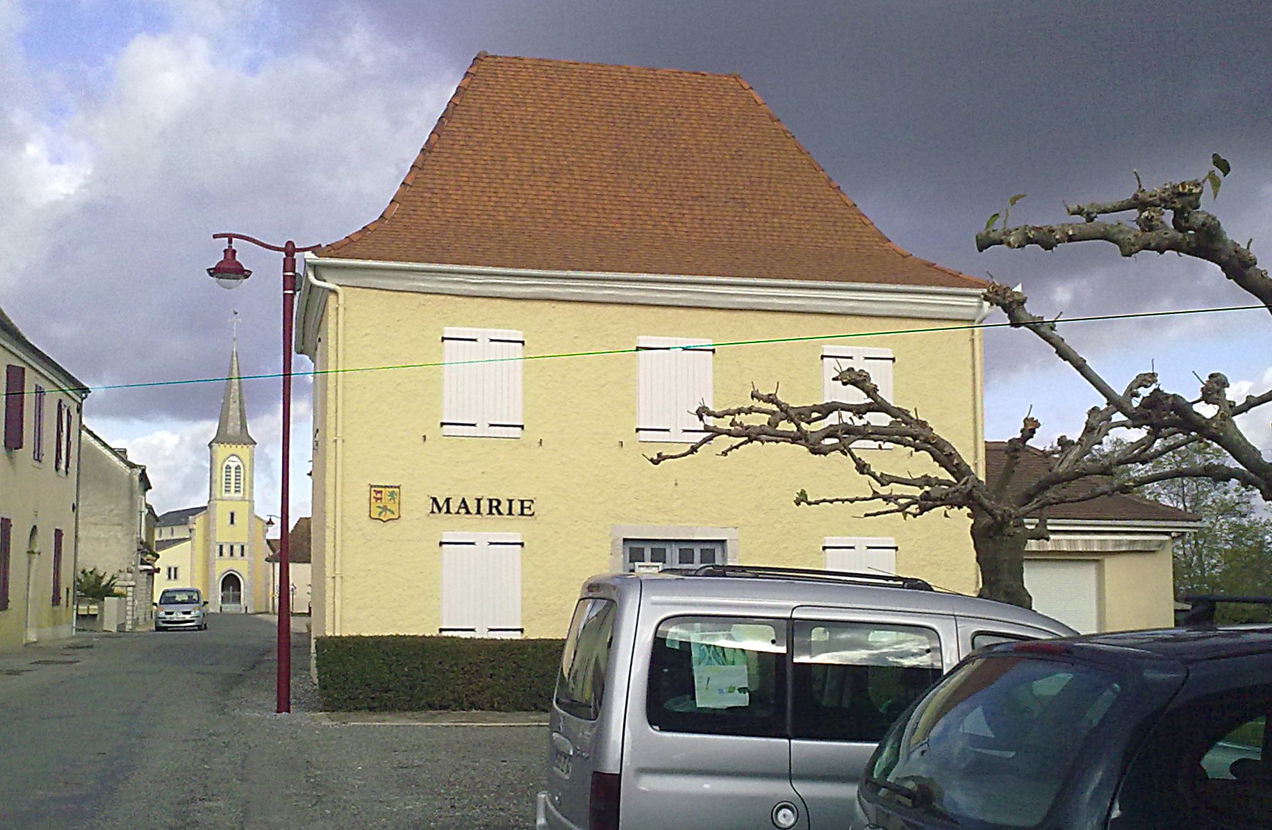 Mesplède